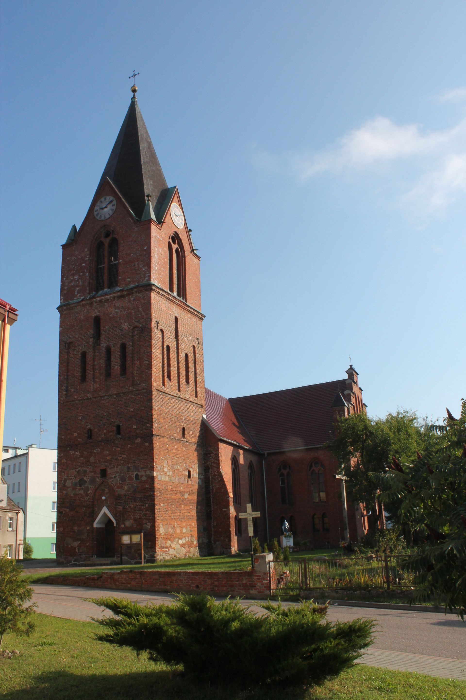 Polanów, powiat koszaliński - kościół par. p.w. Podwyższenia Krzyża Św., XV, 1850